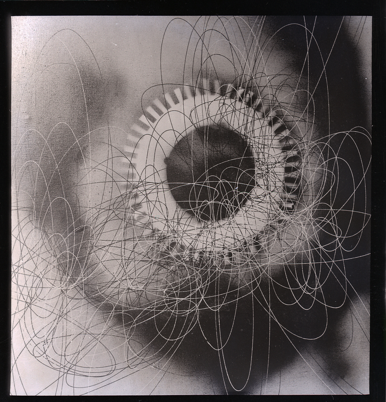 Servizio fotografico : Italia, 1953 / Paolo Monti. - Buste: 30, Fototipi: 30 : Negativo b/n, gelatina bromuro d'argento/ pellicola ; 6x6. - ((Serie costituita da 30 buste di negativi identificati con i nn.: 14585 14586, 14587, 14588, 14589, 14590, 14591, 14592, 14593, 14594, 14595, 14596, 14597, 14598, 14599, 14600, 14601, 14602, 14603, 14604, 14605, 14606, 14607, 14608, 14609, 14610, 14611, 14612, 14613, 14614, e tenute insieme con da una graffetta. - Sulla busta identificata con il n. 14585 iscrizione didascalica con data manoscritta a pennarello: "1953/ Crippa/ Quadri".